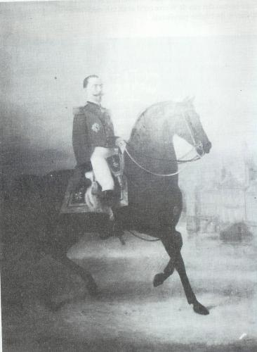 portrait du baron Henri van de Werve et de Schilde, bourgemestre de Schilde